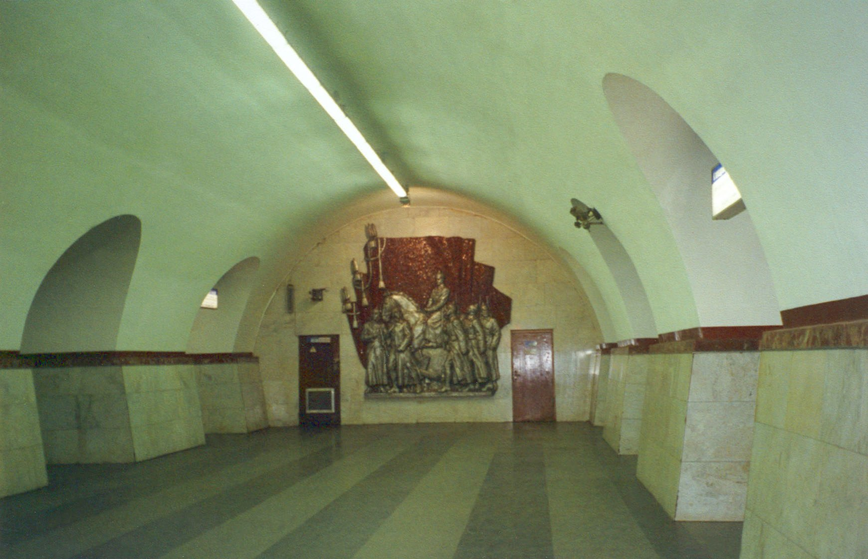 Станция «Фрунзенская» Петербургского метрополитена